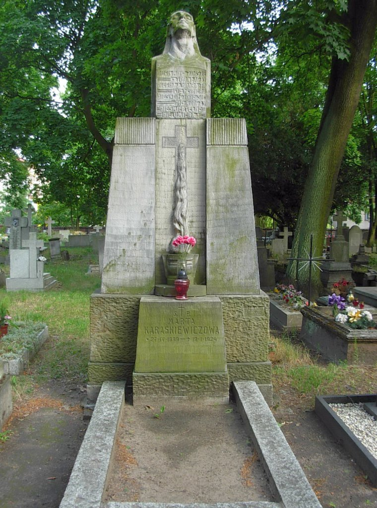 Cmentarz Starofarny Bydgoszcz